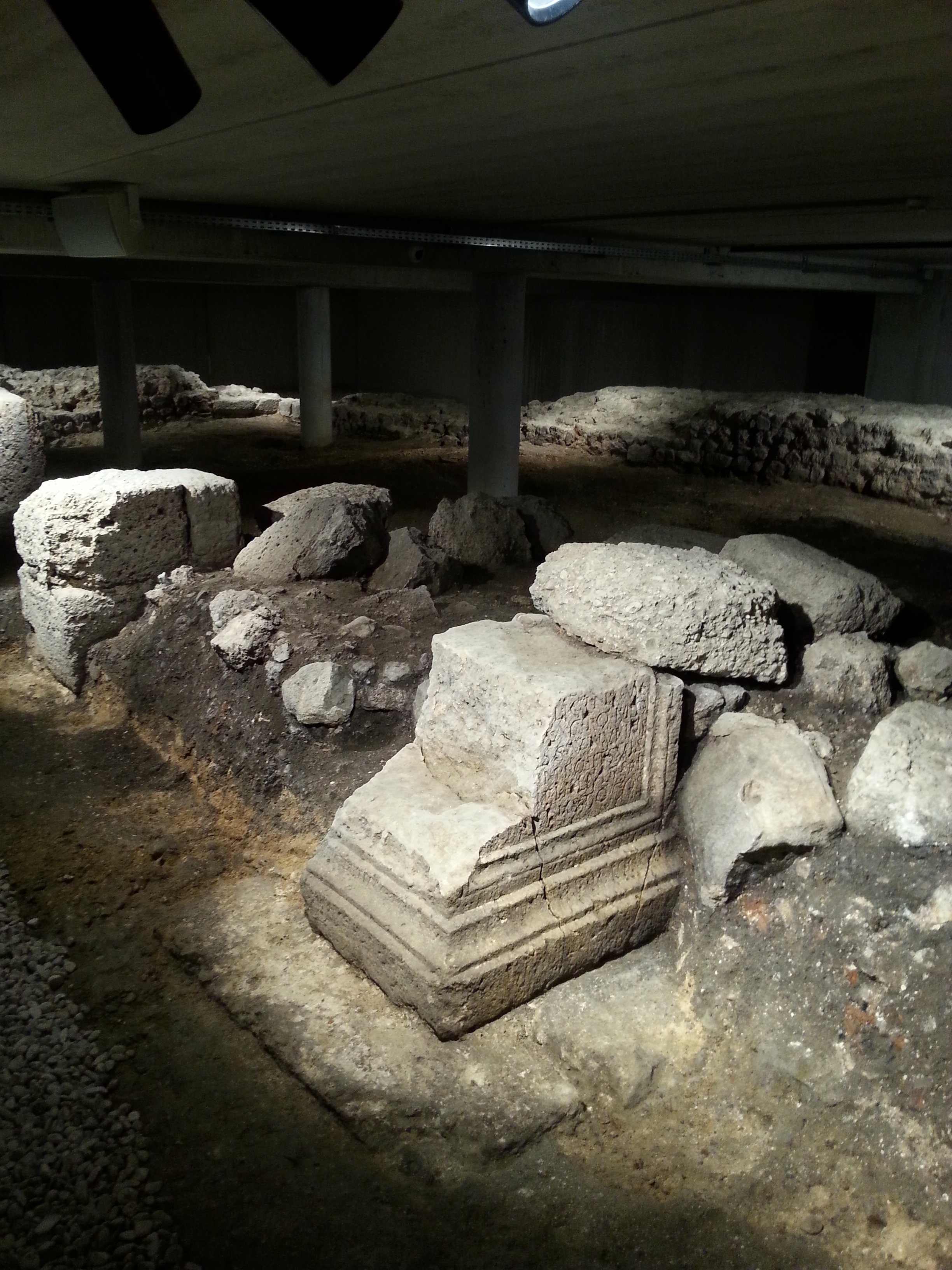 Restkastell Wallsee, in den Mauern verbaute Spolie.